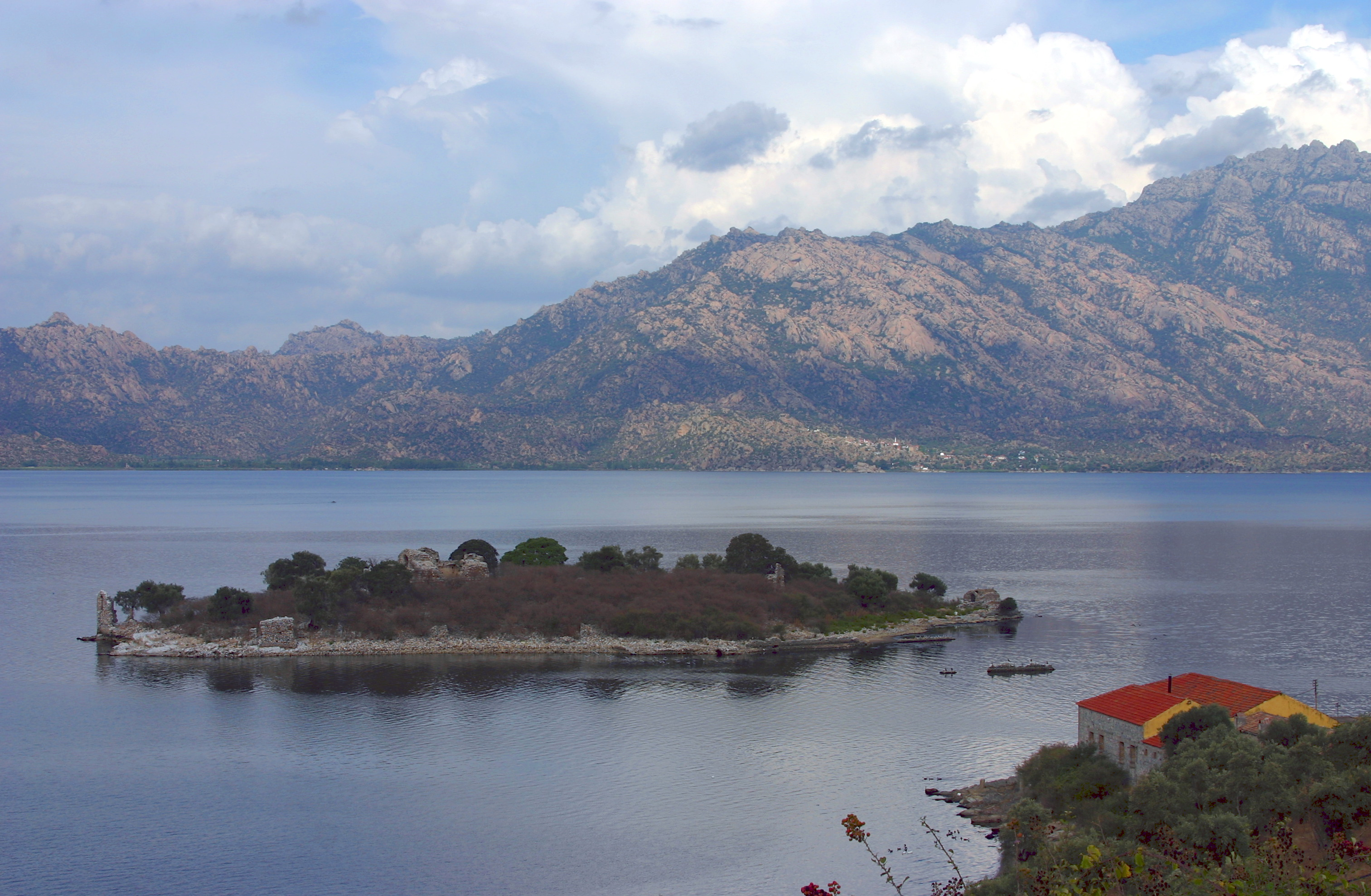 Lago Bafa, na Turquia.